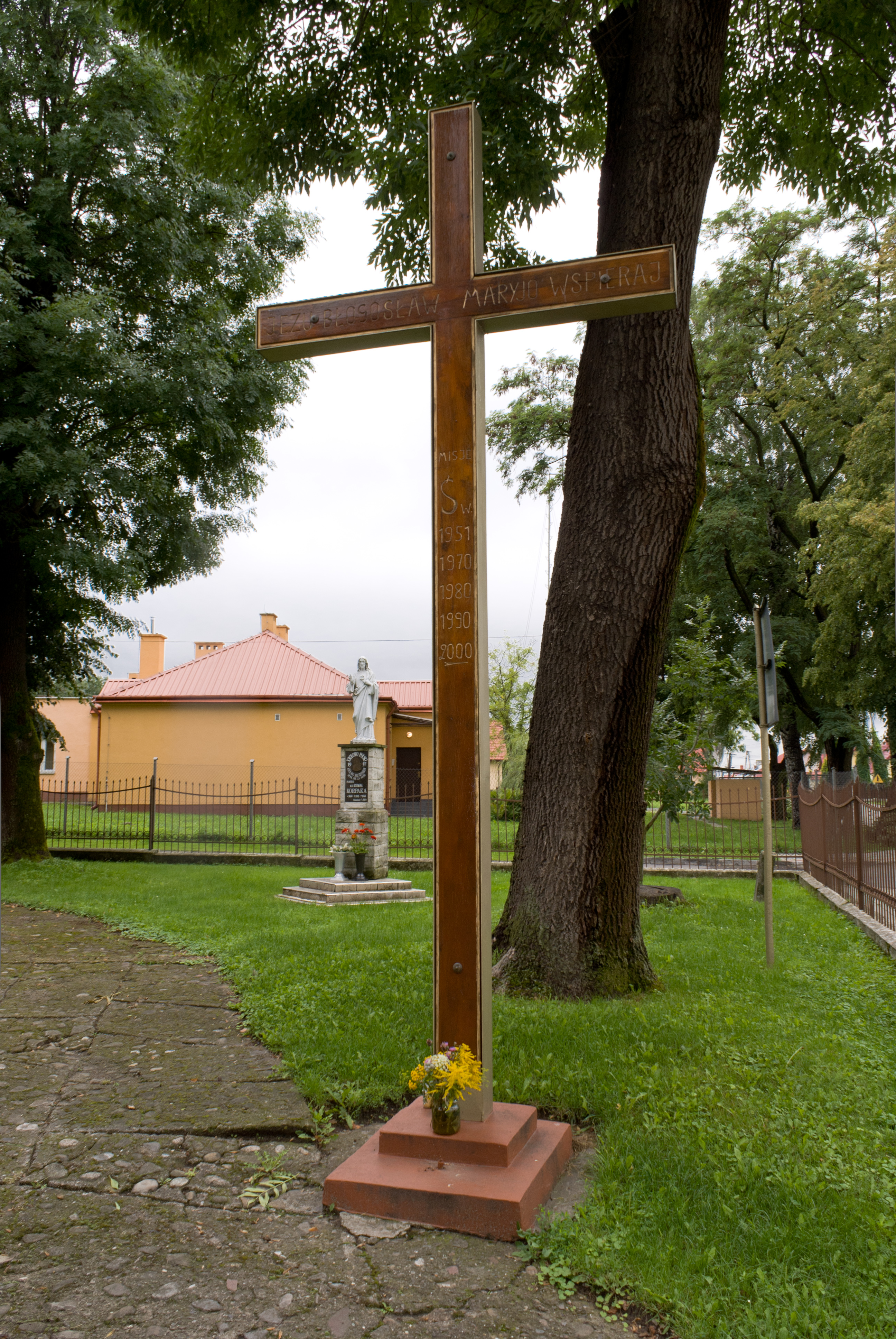 Krzyż - pamiątka misji świętych przy zabytkowym kościele pw. św. Piotra i św. Pawła w Medyce.